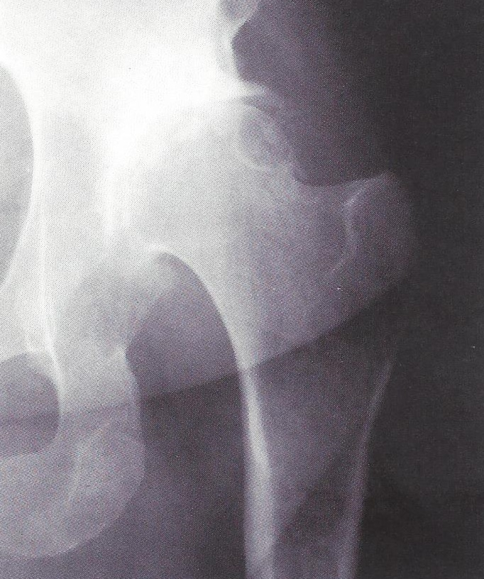 Sekundäre Pseudopfanne bei dysplasiebedingter Hüftluxation einer erwachsenen Frau